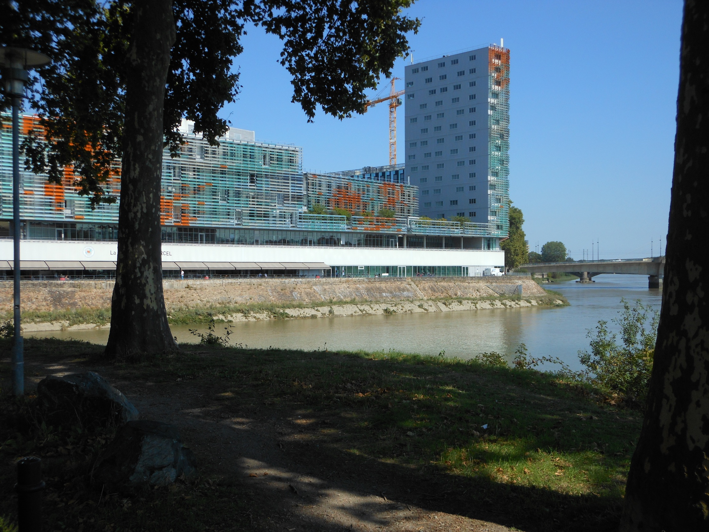 iea nantes